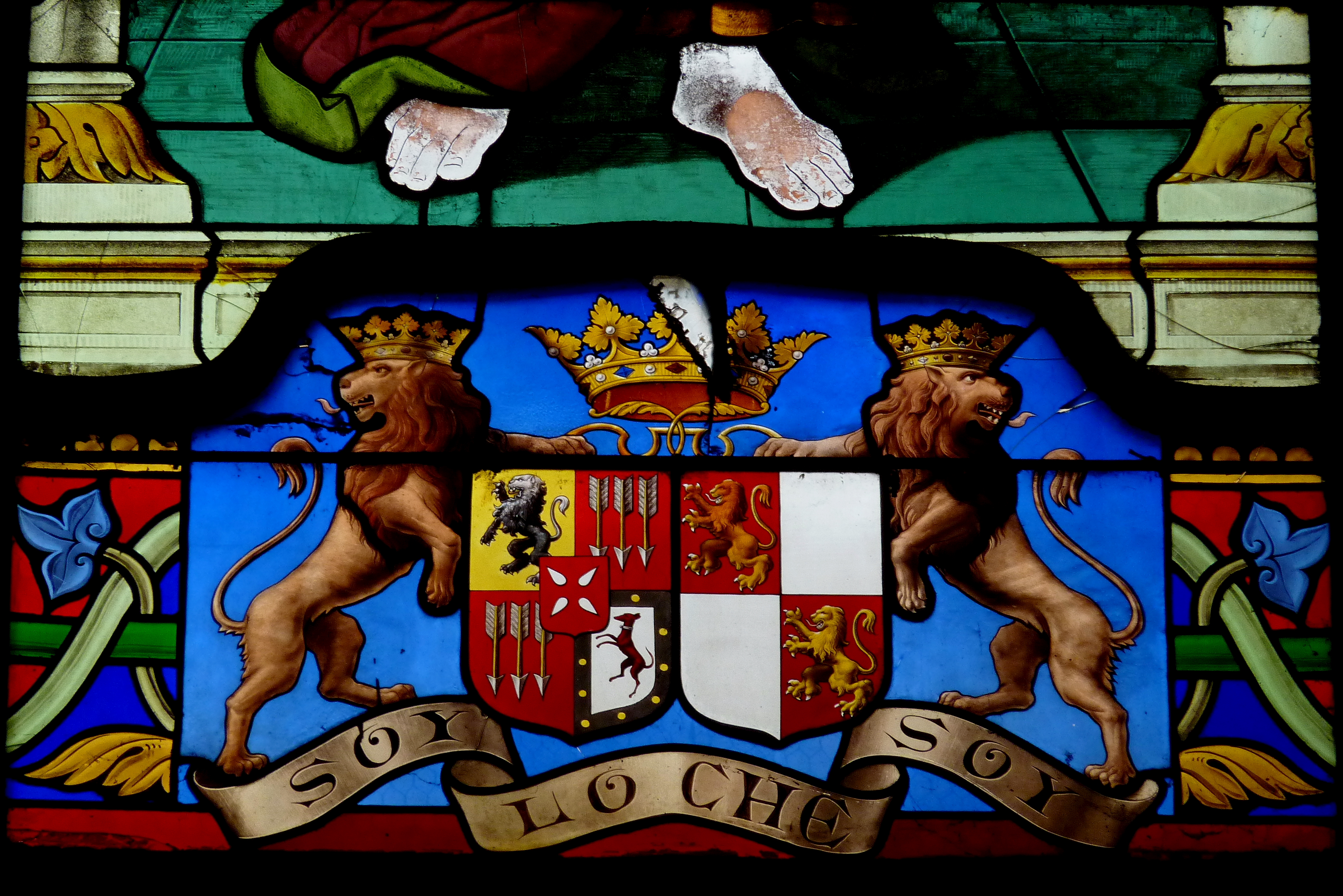 Bleiglasfenster in der katholischen Kirche Saint-Martin in Chevreuse im Département Yvelines (Île-de-France/Frankreich); Detail des Fensters des heiligen Josephs, Wappen mit der Devise: SOY LO QUE SOY (ich bin der ich bin)